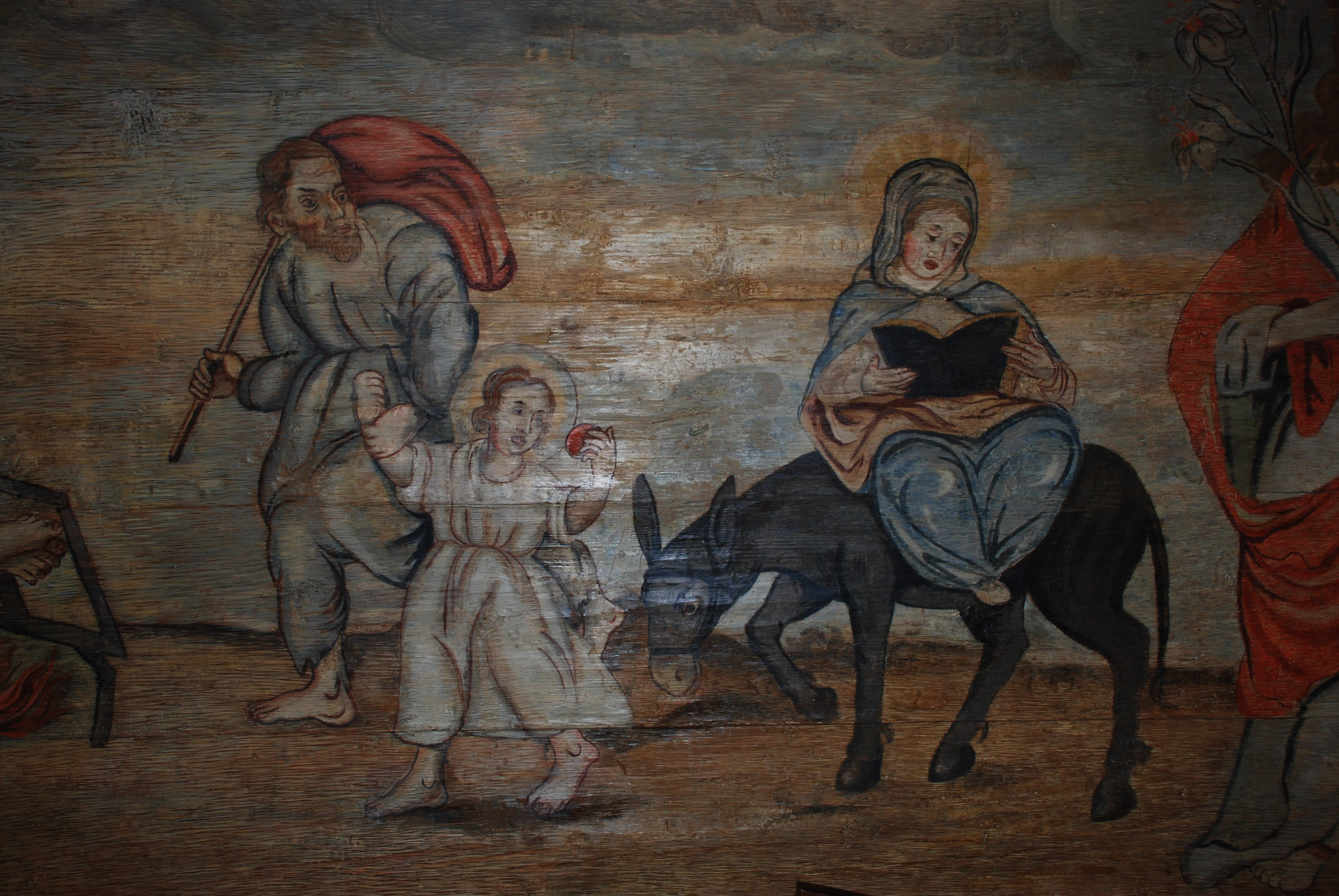 Dekoracja malarska w nawie: Święta Rodzina powracająca z Egiptu